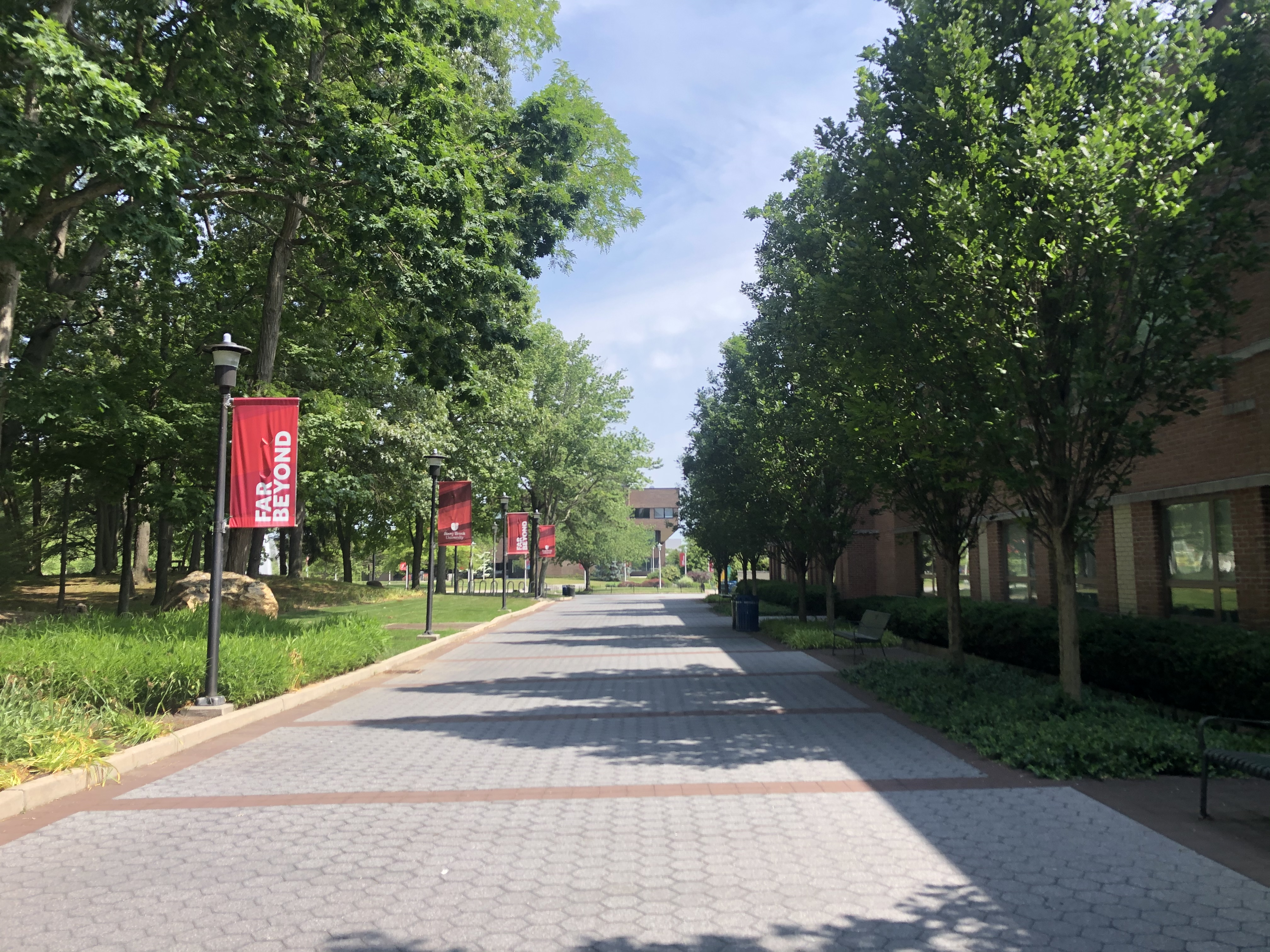 Stonybrook campus